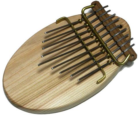 アースサウンド・カリンバという楽器の表 愛知万博の日本館のサイト「サイバー日本館」内の「どこでもニッポンカン」というコーナーで頂いたもの。 １３２人目による撮影